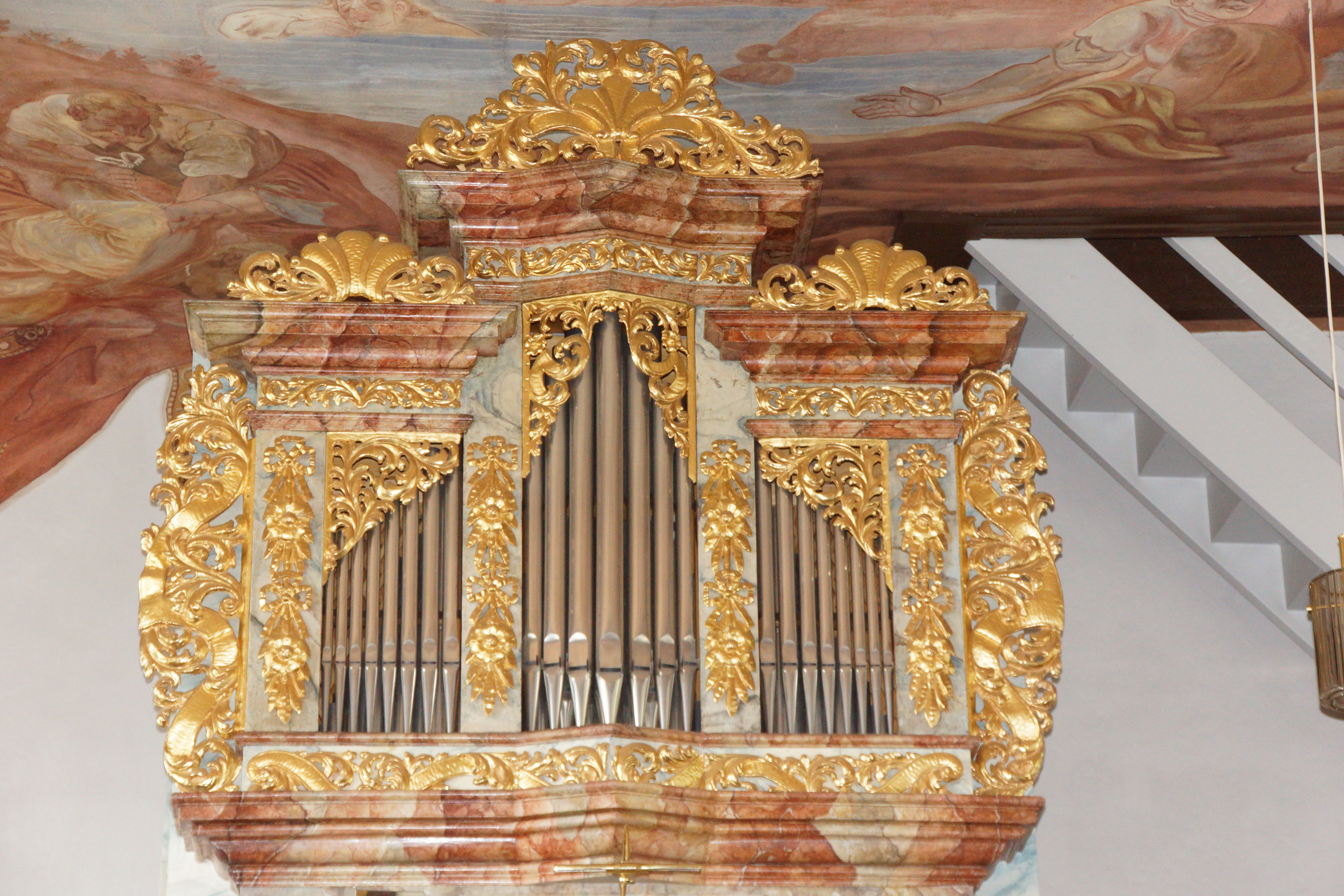 Die Pfarrkirche St. Emmeram in Oberkölblitz